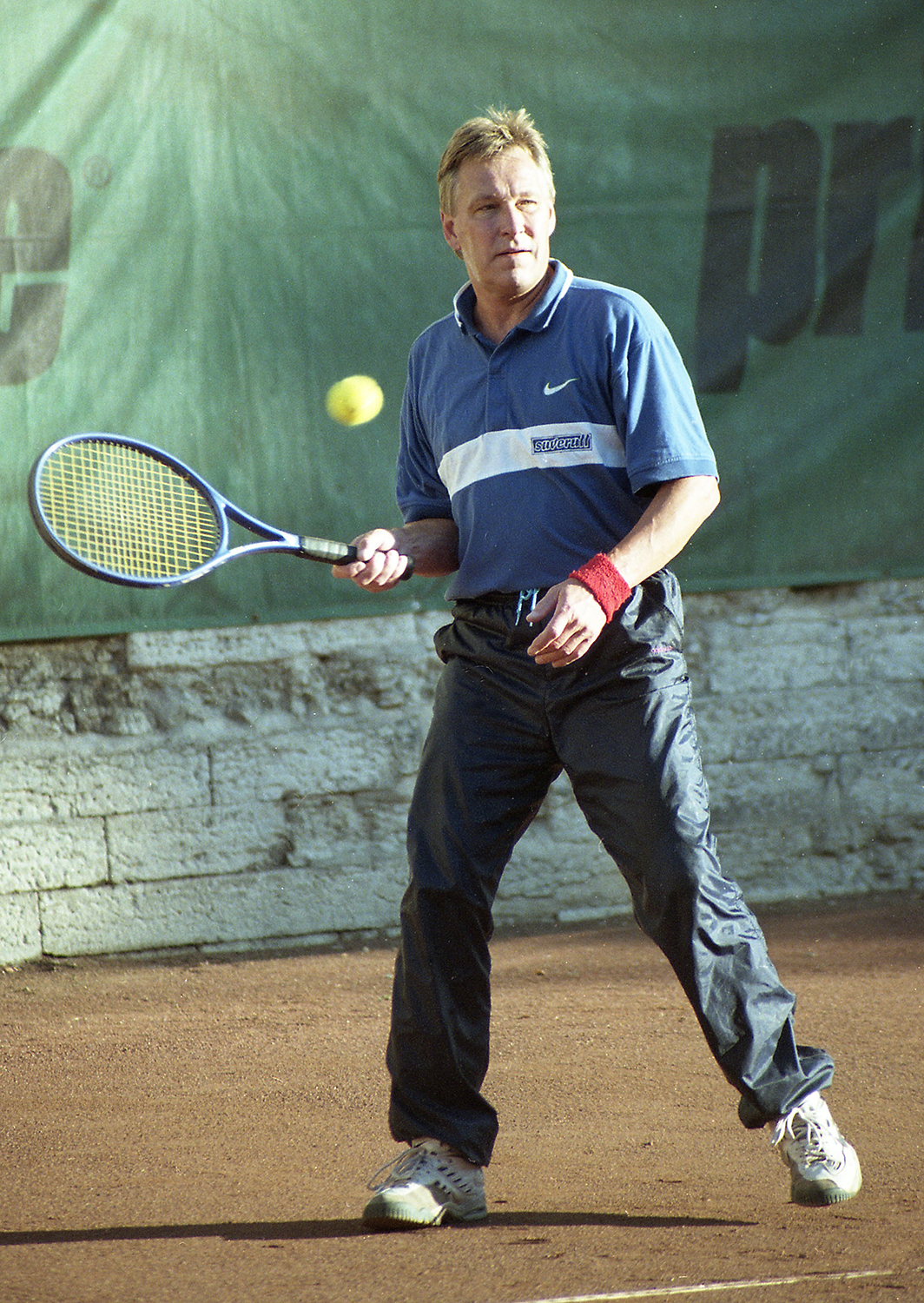 Toomas Savi poliitik ja endine spordiarst 99